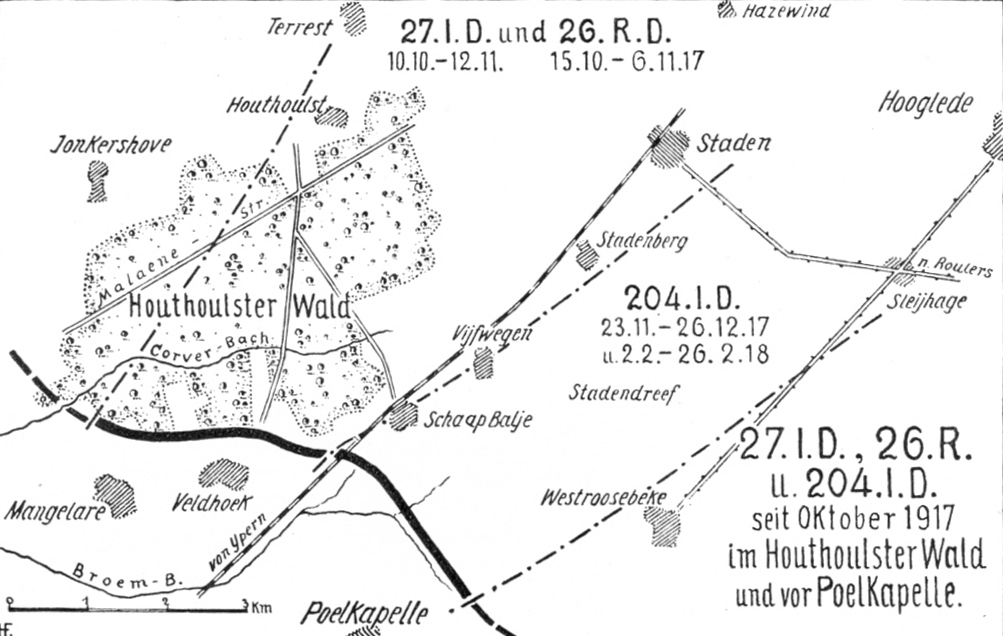 Karte: Württembergische Divisionen (26. Res.-Div., 27. Inf.-Div., 204. Inf.-Div.) in der Dritten Flandernschlacht 1917